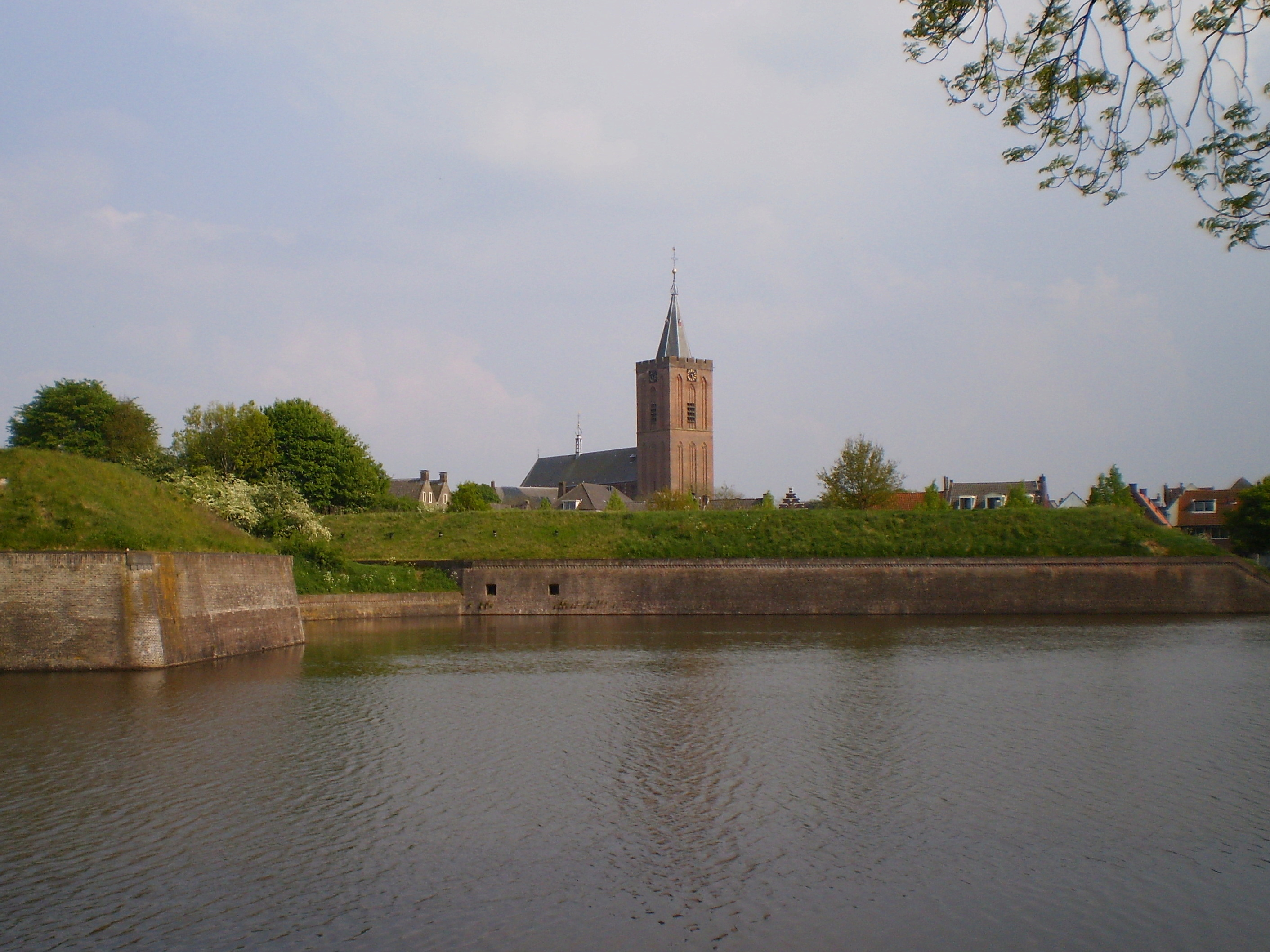 Vestingwerken van Naarden-Vesting